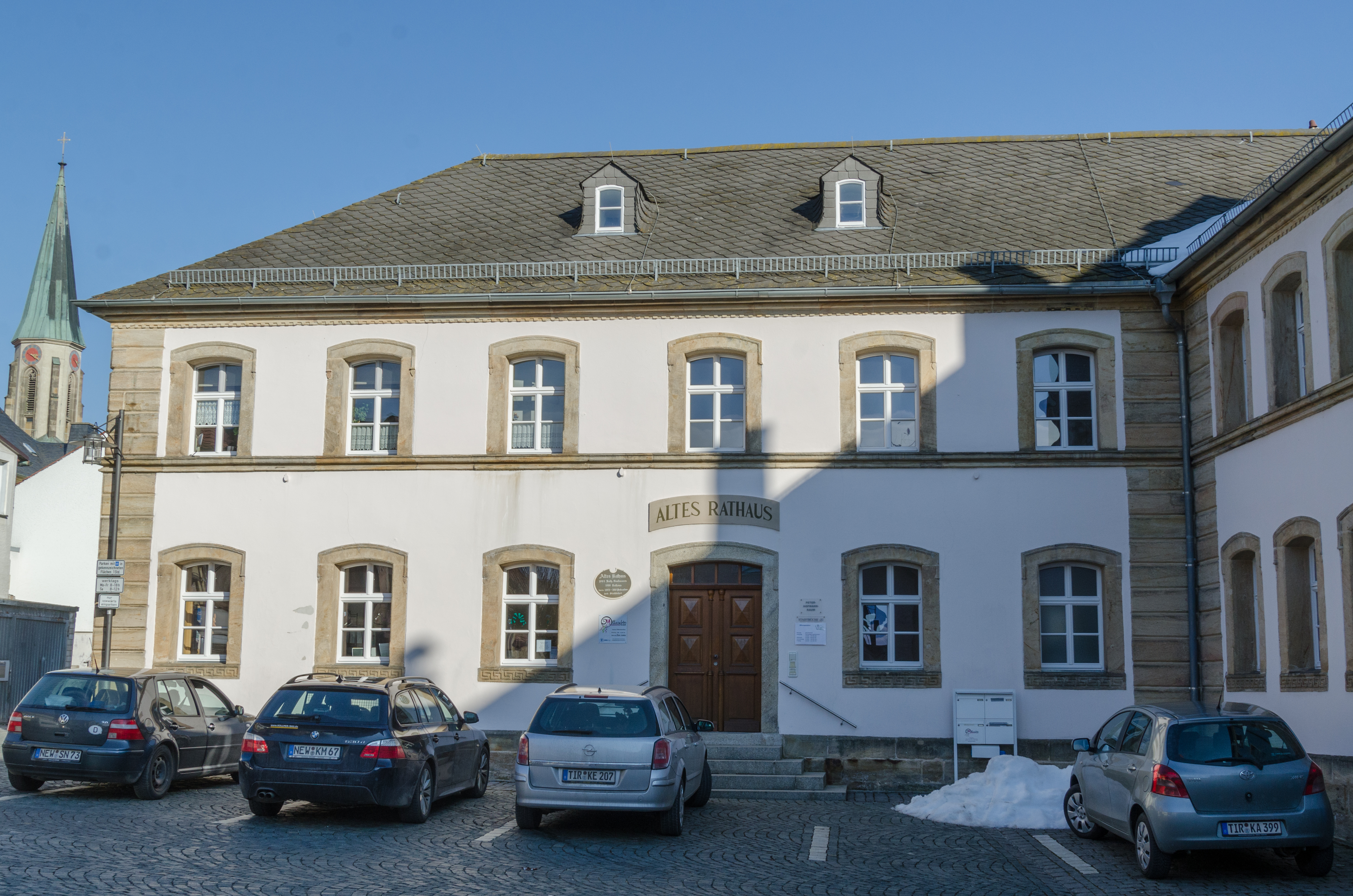 Kemnath, Rathausplatz 1